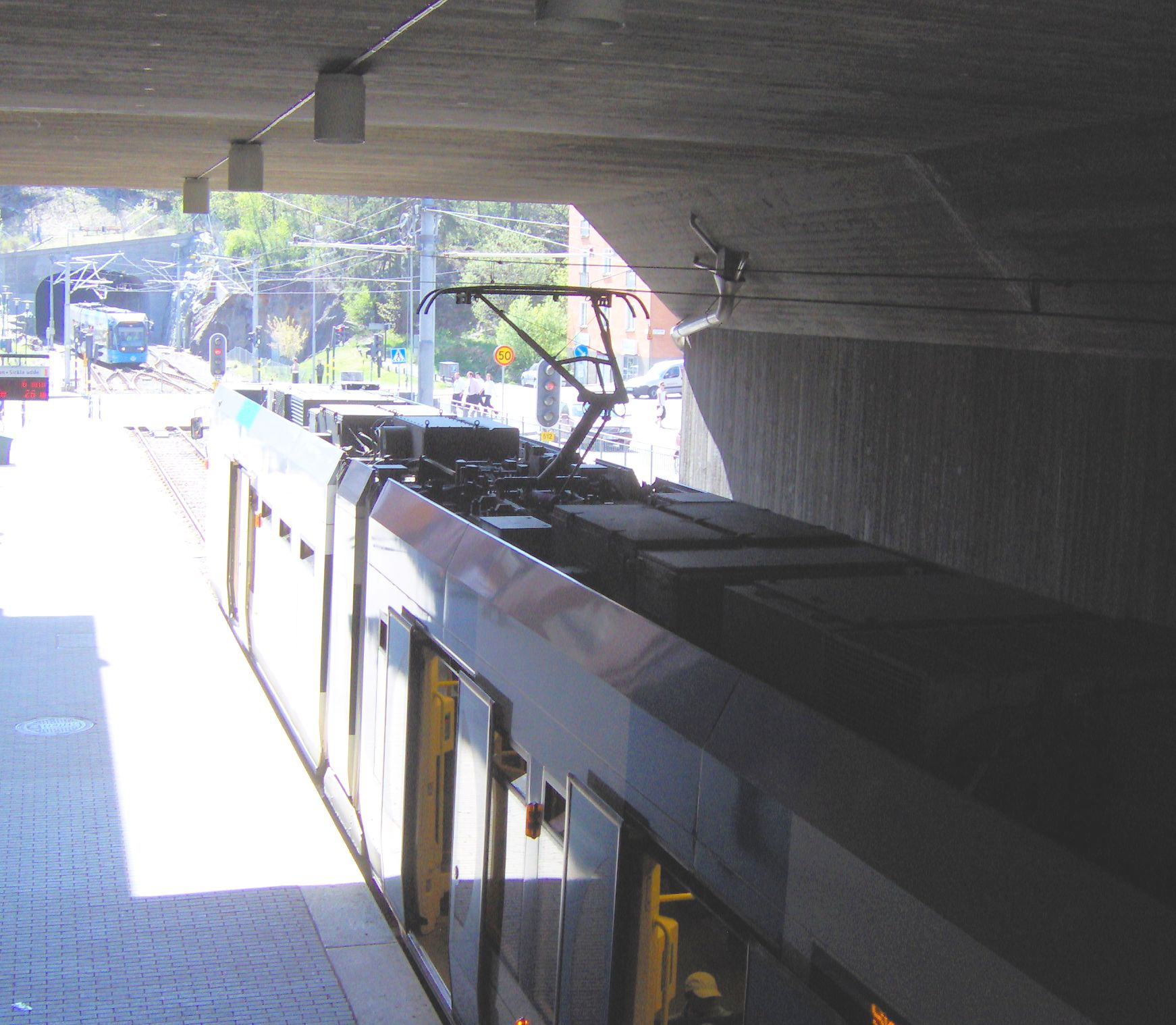 Tvärbanans Alvikstation, Stockholm. Tramlinje station Alvik, Stockholm, Sweden